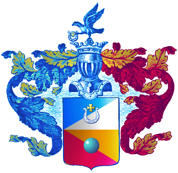 герб генерала Александра Андреевича Лачинова (модификация герба Лачиновых из Гербовника - Общий гербовник. Москва. 1799, в соответствии с описанием из дела А.А.Лачинова (дело 1817 г.)